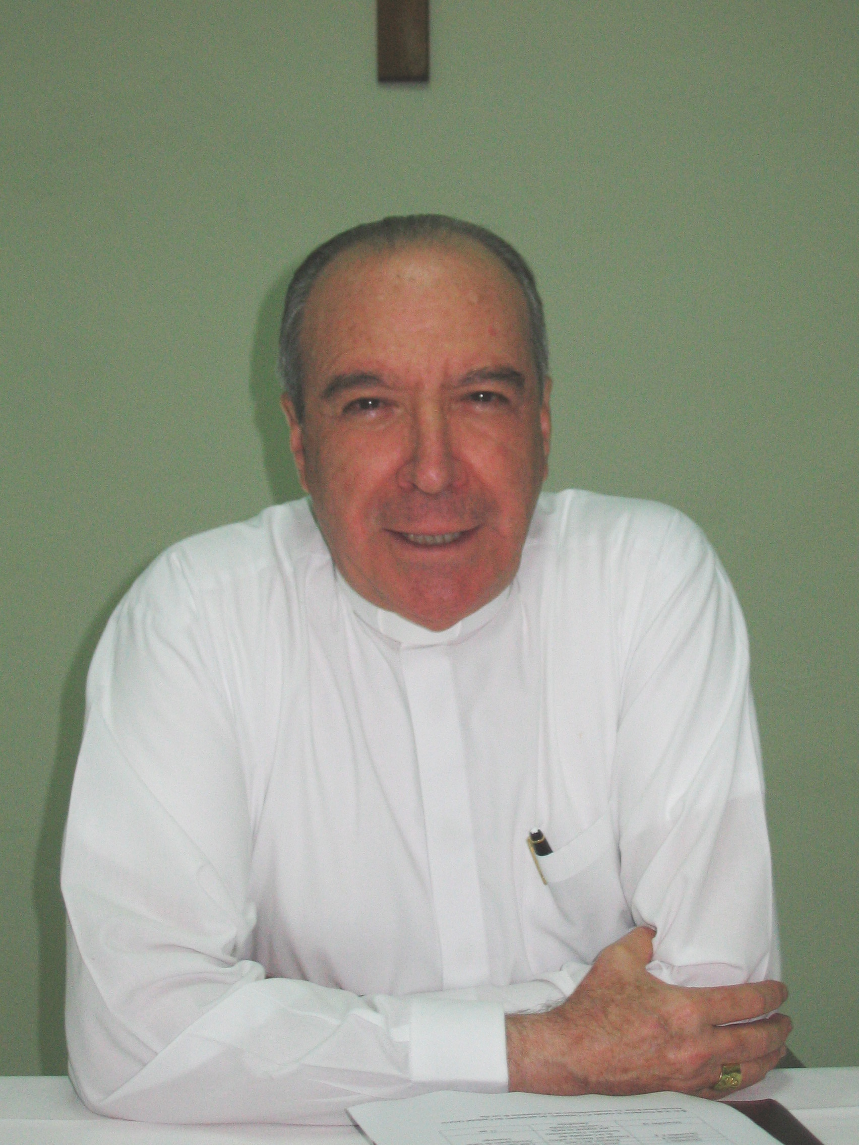 Cardinal Nicolás de Jesús López Rodríguez, archibishop of Santo Domingo, Dominican Republic.